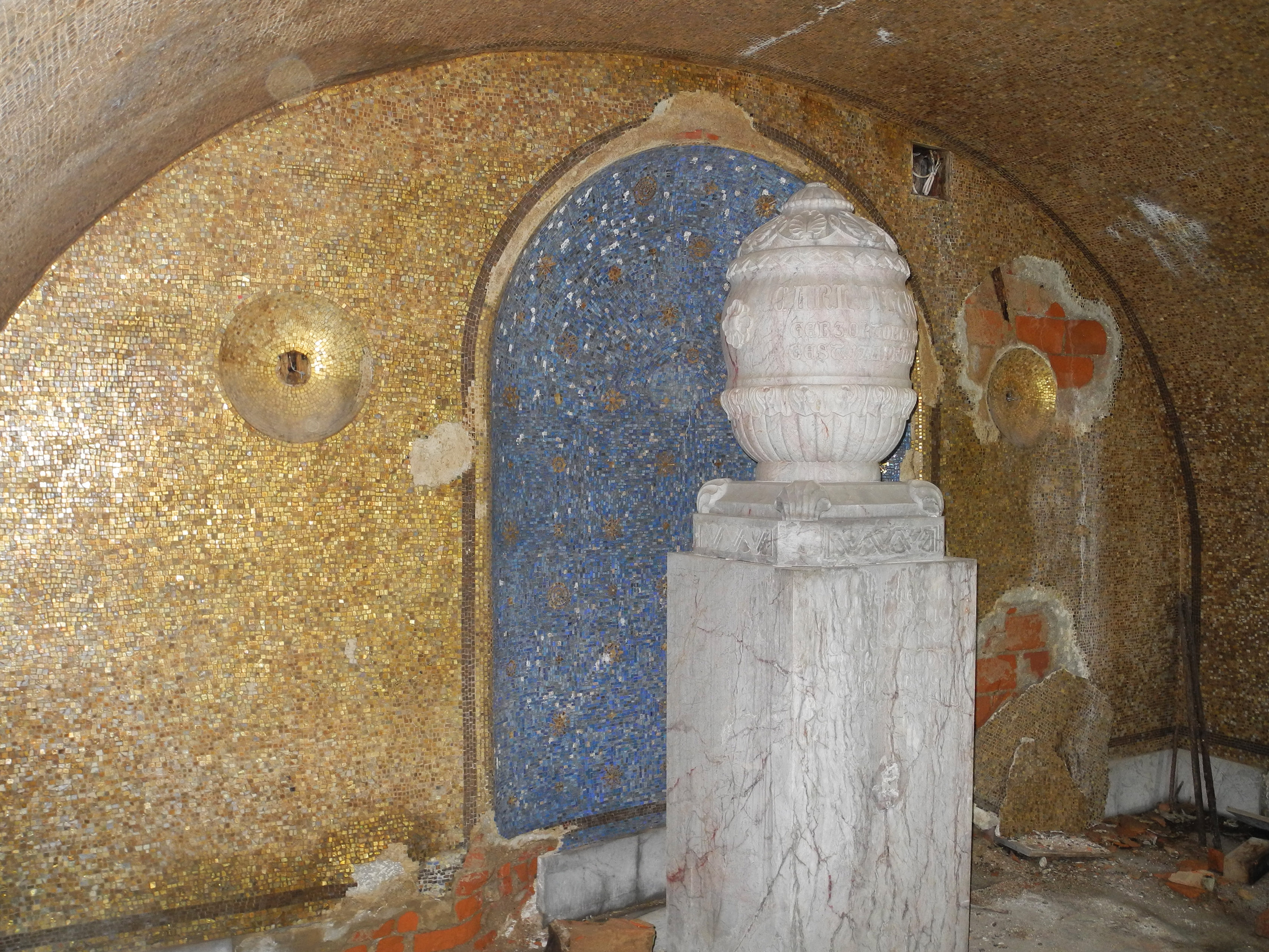 Krypta der Dittrich-Grabkapelle auf dem Friedhof in Schönlinde (Krásná Lípa). Vasenskulptur für Carl Dittrich jr. (1853–1918) vor blauer Mosaikwand, vermutlich Schmuckurne mit der Asche des Verstorbenen.